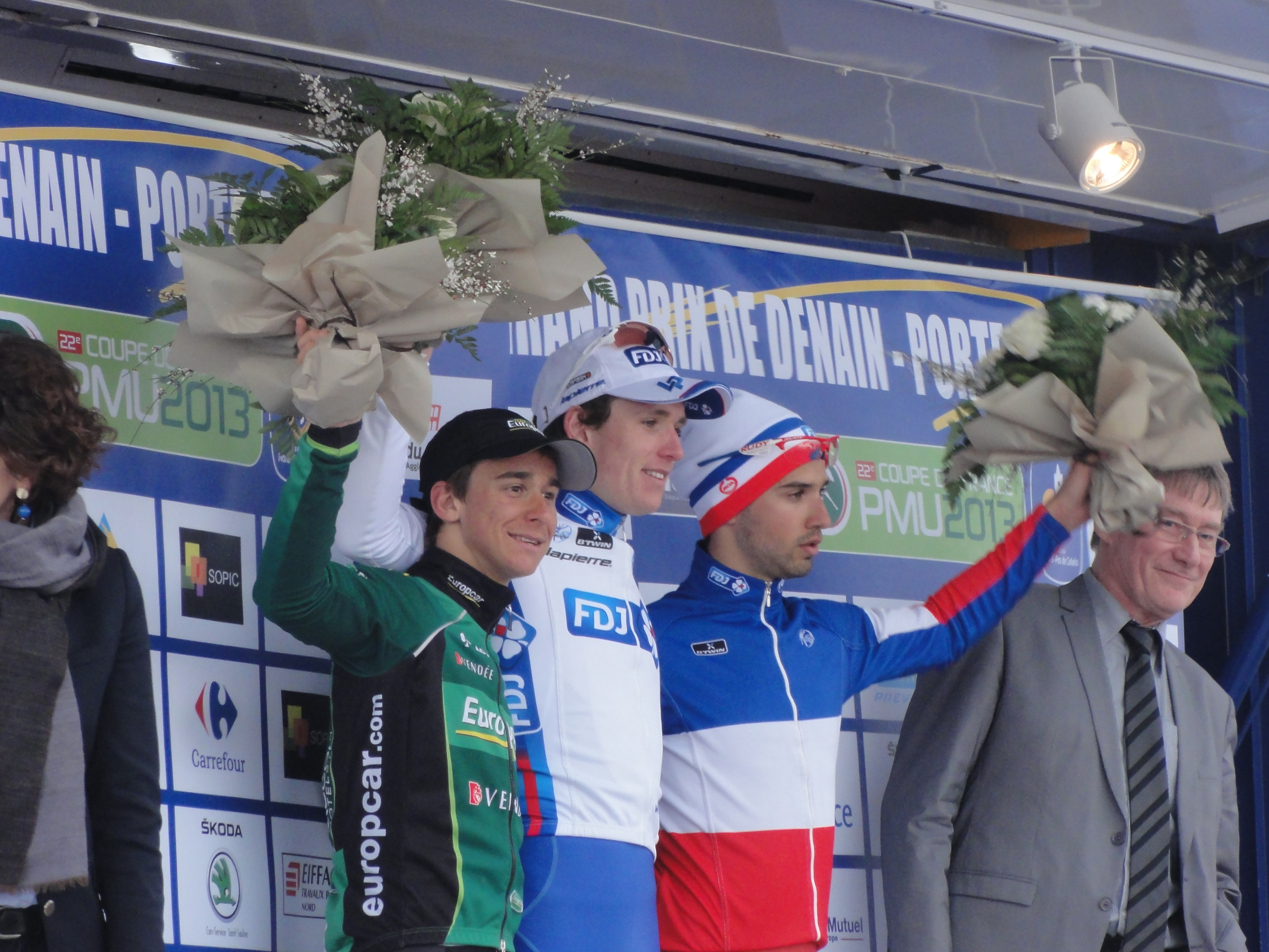 Reportage photographique réalisé le mardi 11 avril 2013 durant l'édition 2013 du Grand Prix de Denain à Denain, Nord, Nord-Pas-de-Calais, France. Depicted people: Bryan Coquard, Arnaud Démare and Nacer Bouhanni